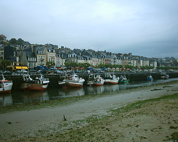 Port de Trouville-sur-Mer, Port de Trouville-sur-Mer.